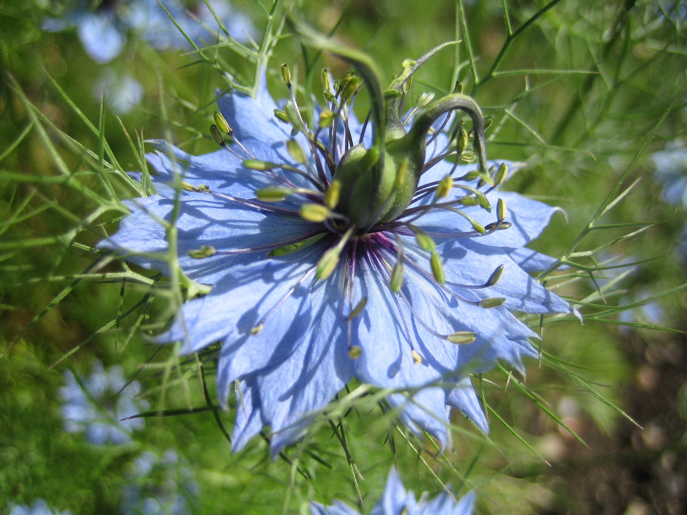 Nigella_damascena, "Love in a mist"